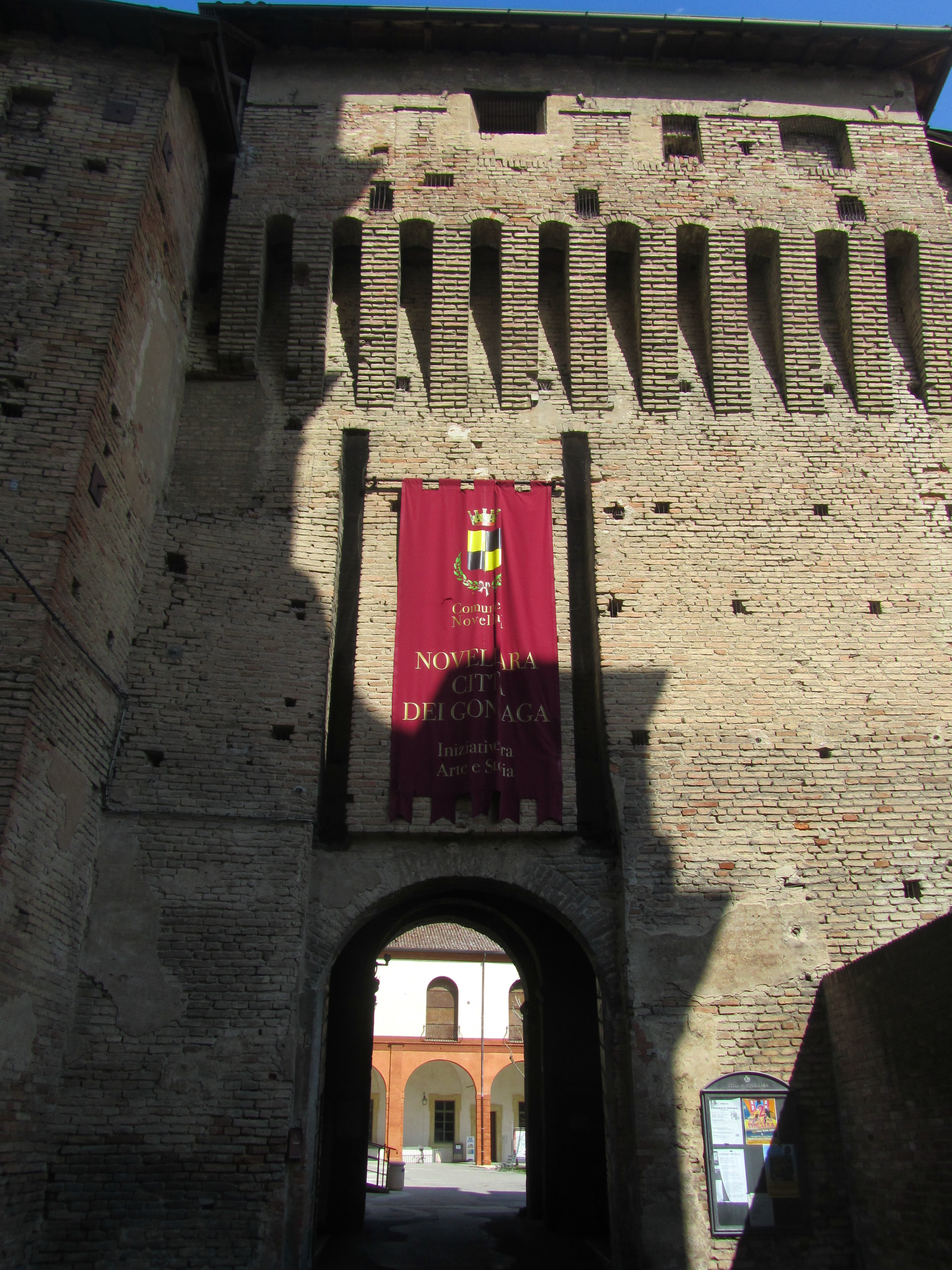 Ingresso della rocca di Novellara, provincia di Reggio nell'Emilia.